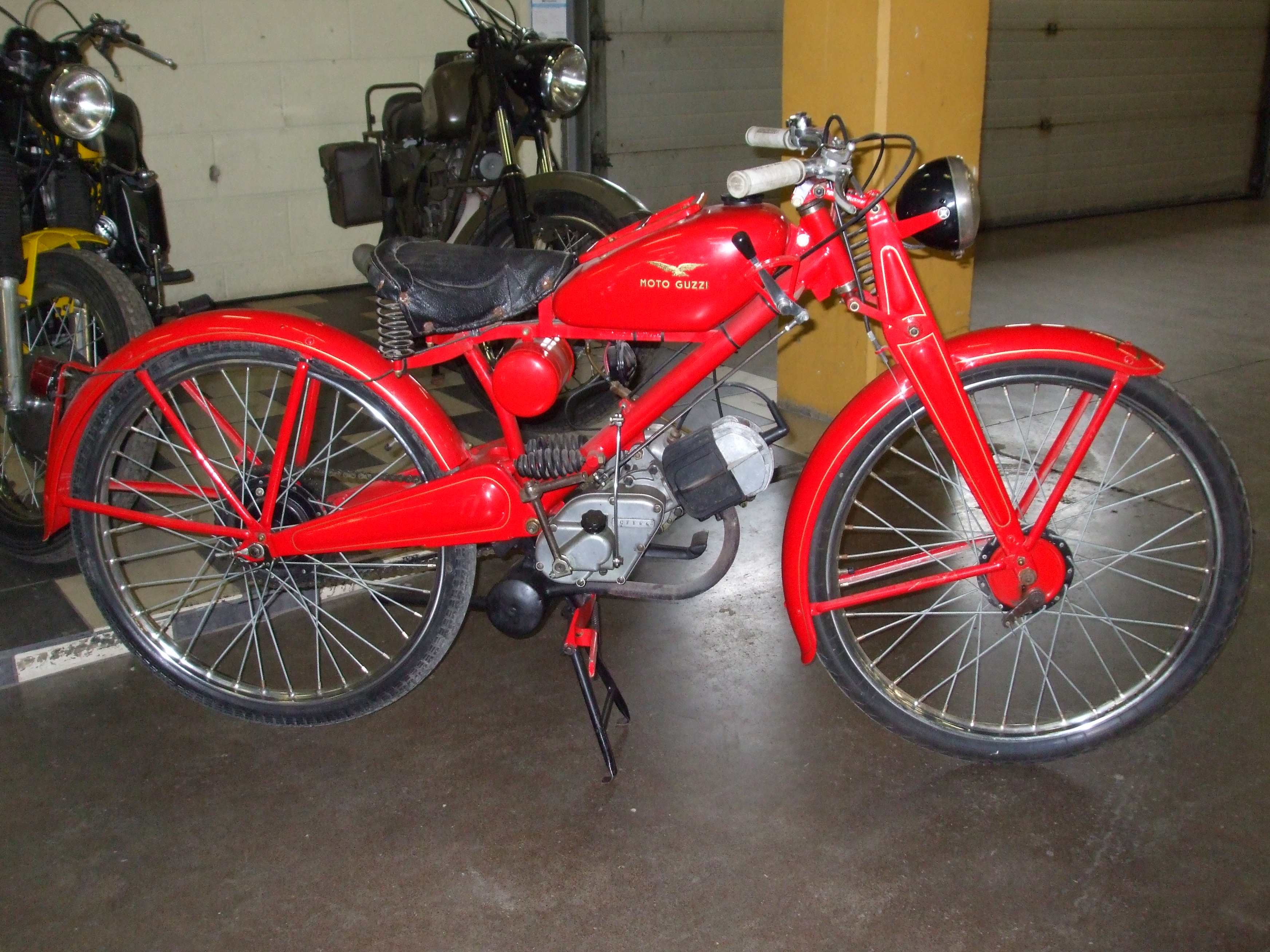 roter Moto Guzzi Oldtimer bei der Retro in La Louvière